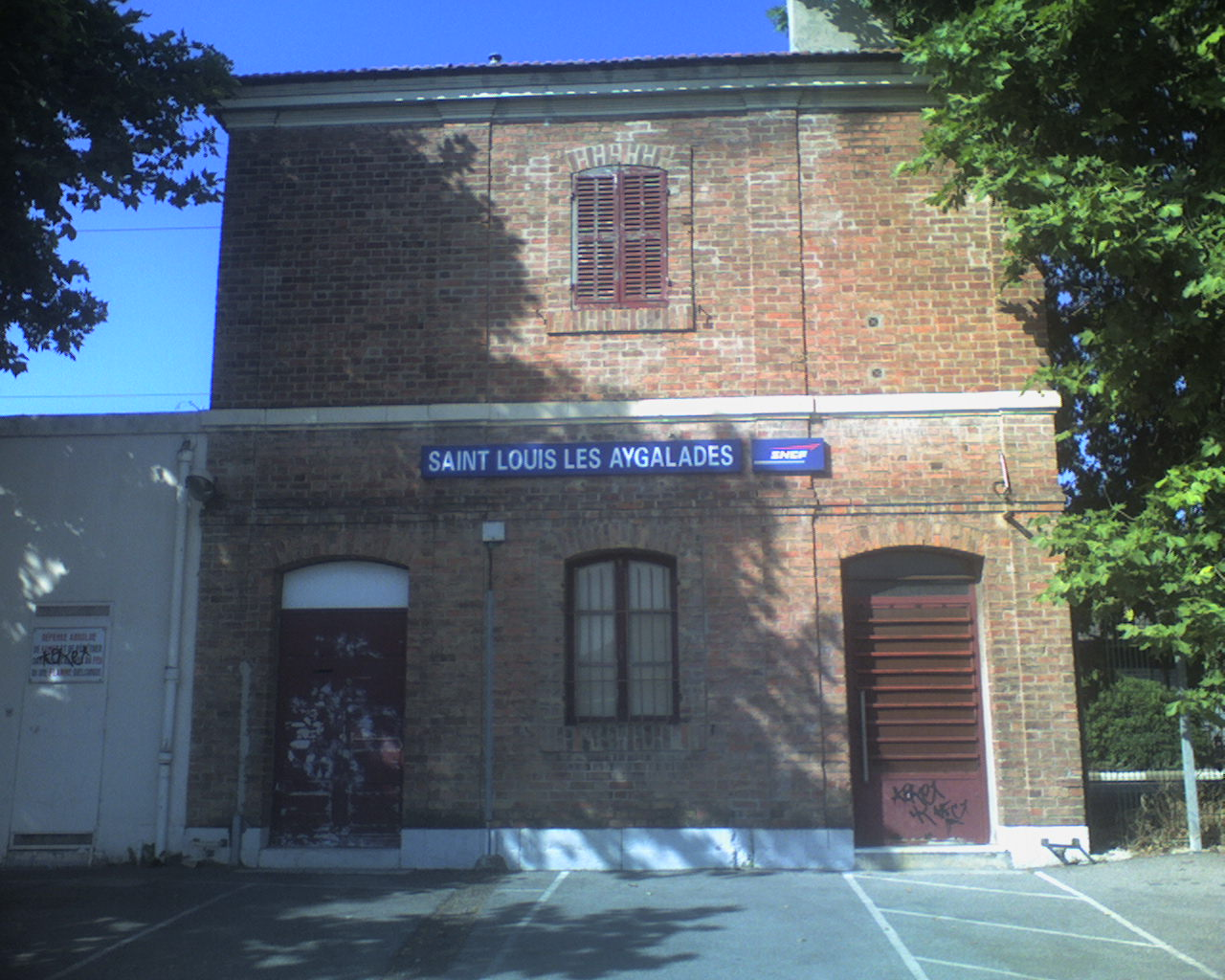 Gare de Saint-Louis Les Aygalades (Marseille).